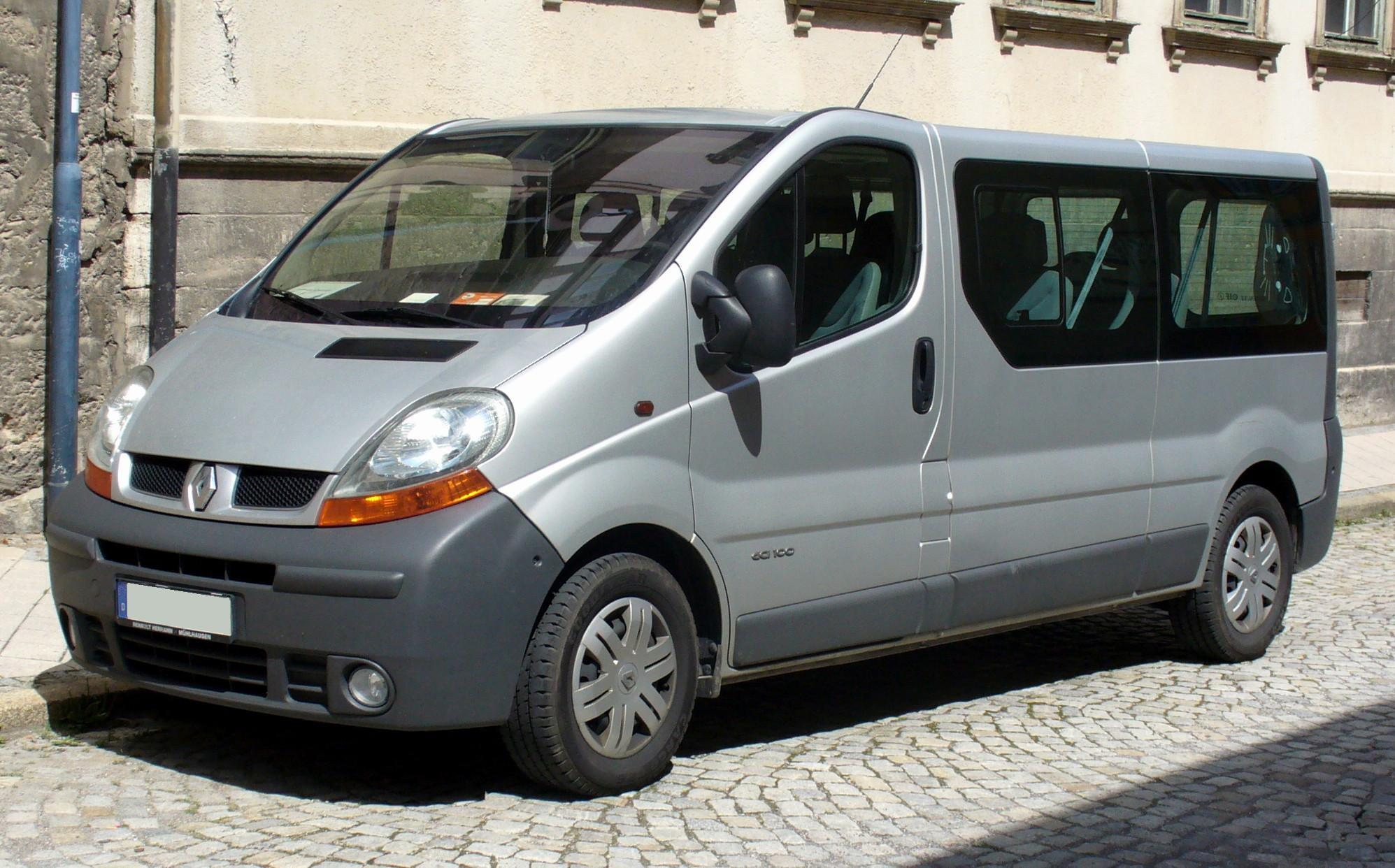 Renault Trafic